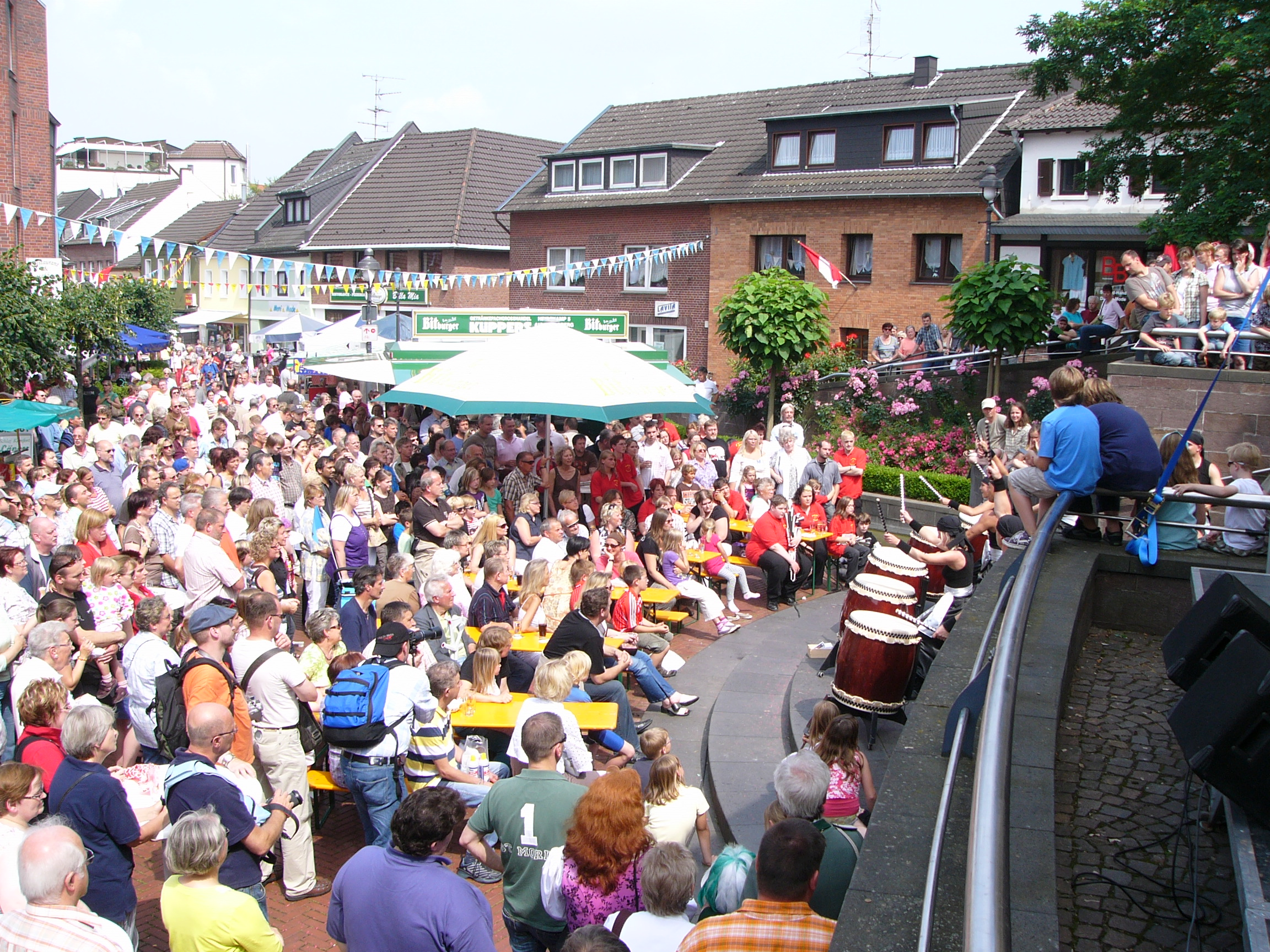 Schützenfest